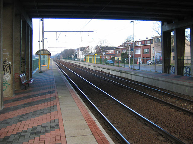 station van Sint-Mariaburg in Ekeren